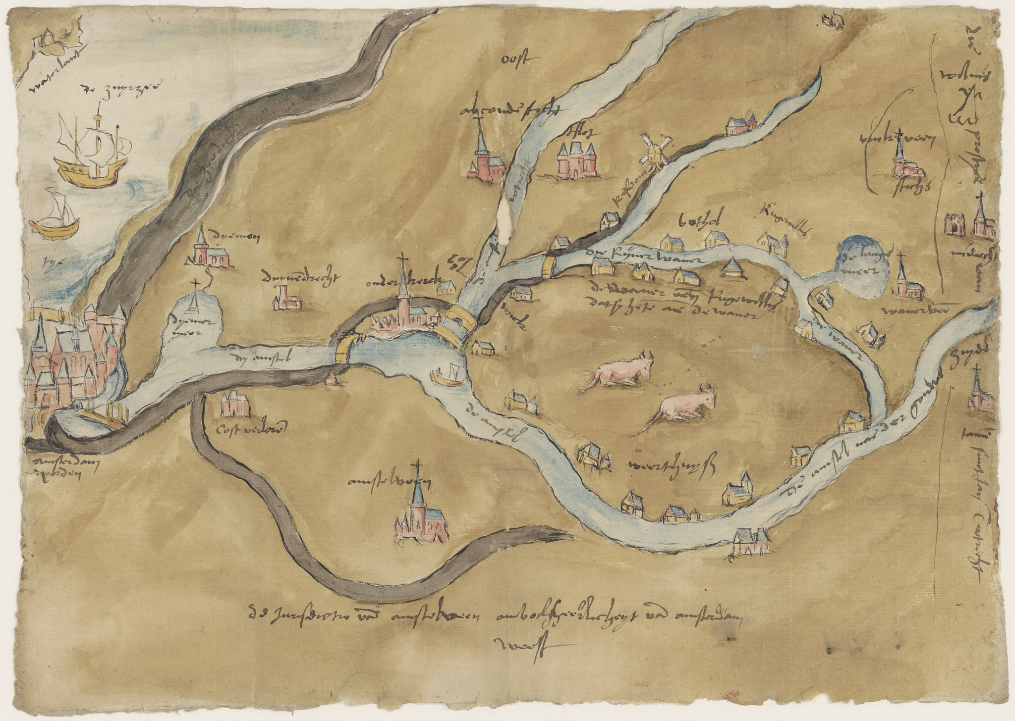 Kaart van het noordelijke stroomgebied van de Amstel: linksonder Amsterdam, linksboven de Zuiderzee en Waterland, rechtsboven Mijdrecht. Amsterdam is hier zo eenvoudig mogelijk weergegeven. Binnen de stadsmuur zijn alleen het stadhuis en de Nieuwe Kerk als symbool van wereldlijk en geestelijk gezag herkenbaar. Uit register met keuren en voorschriften van Gouda.